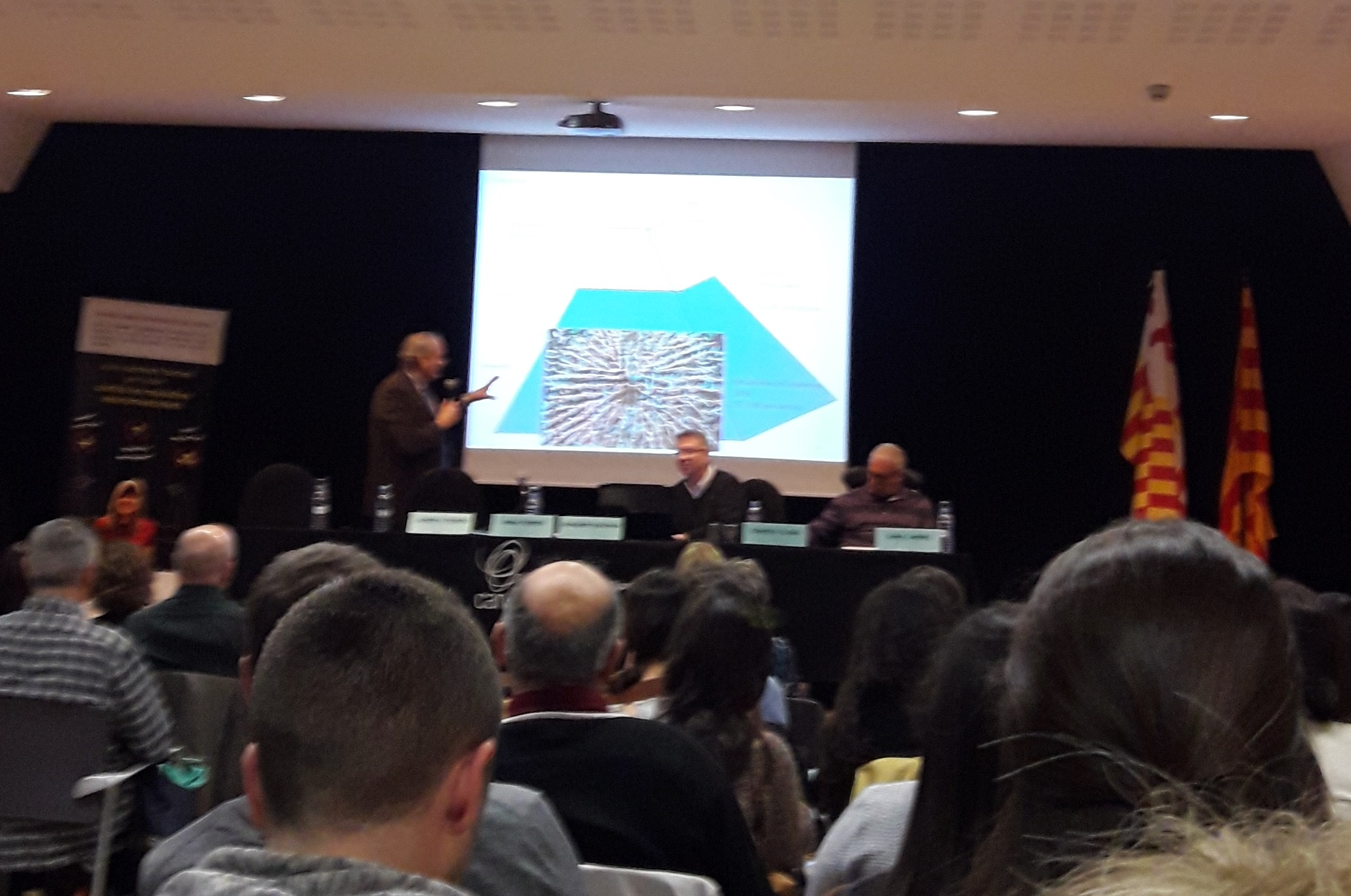 Jornada de debat sobre el programa de rehabilitació i fisioteràpia domiciliària per a persones amb malalties neuromusculars, a l'auditori Can Fabra i organitzada per ASEM Catalunya. Piràmide d'usuaris i implicats usant com a analogia als castellers.